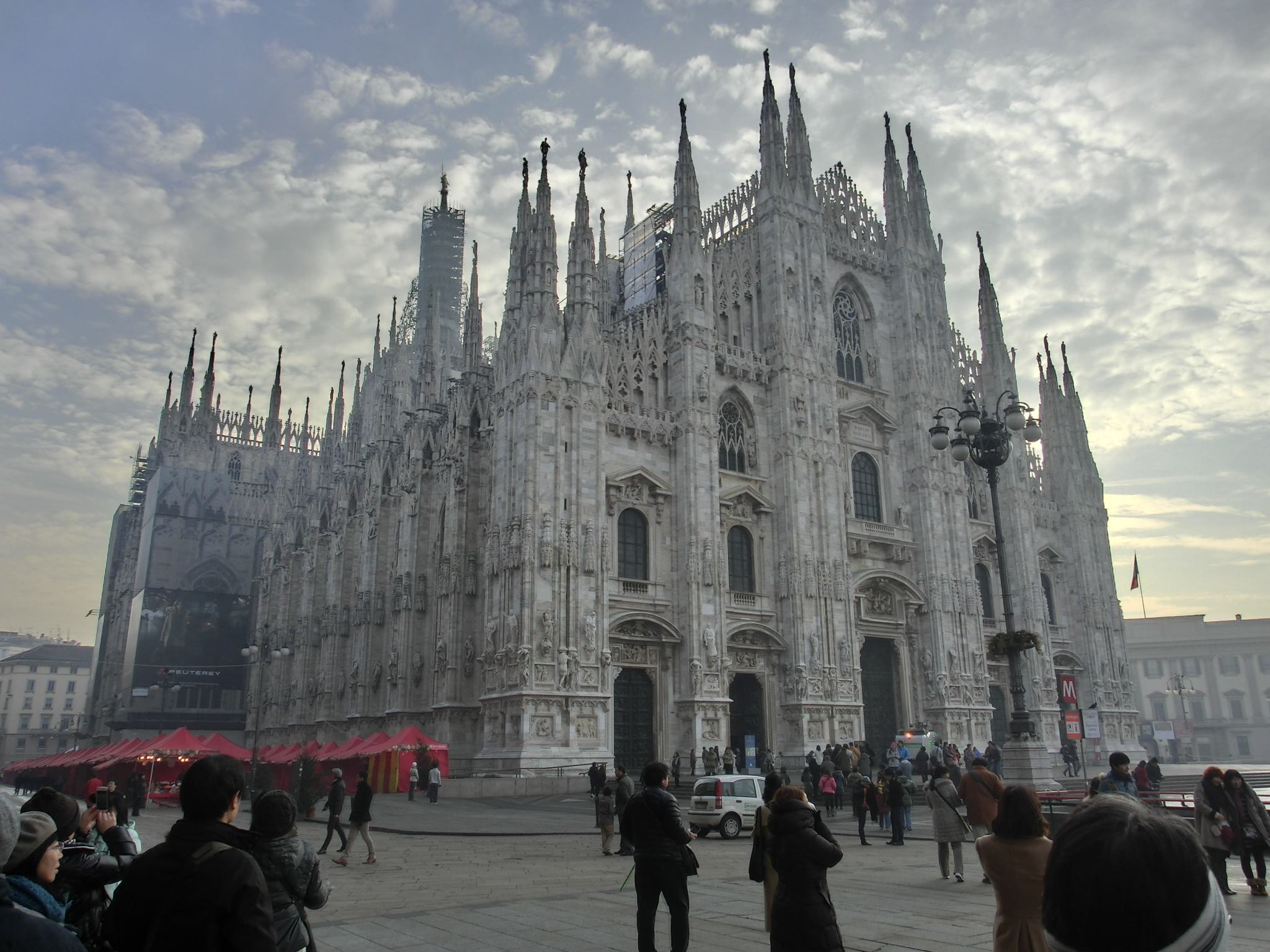 ミラノ大聖堂外観